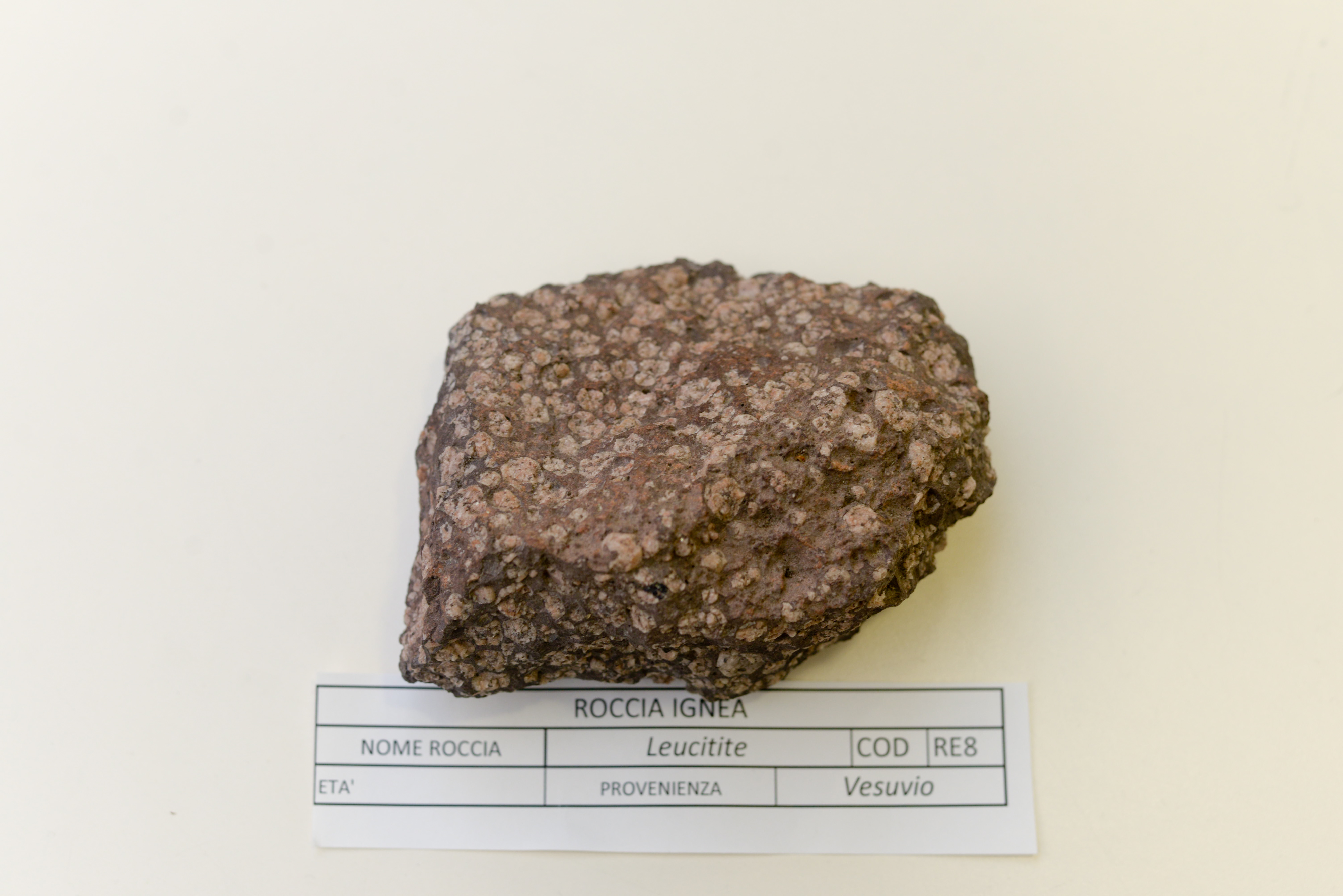 Leucitite proveniente dal Vesuvio (RE 8)